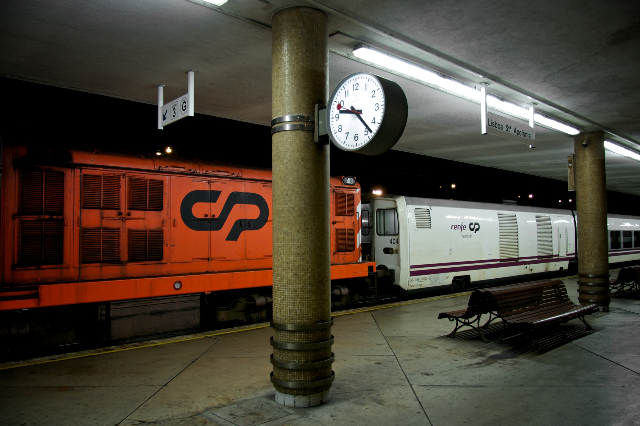 Tipo: Marcha 95601 (Comboio Internacional Sud Expresso 310 + Lusitânia Comboio Hotel 335) [Lisboa • Santa Apolónia - Coimbra–B] Local: Estação de Santa Apolónia [Linha do Norte, PK 0,0] Data e hora: 23 de Janeiro de 2013 [21h24] Material: Locomotiva 1413 + duas composições Talgo IV (14 carruagens e 4 furgões)